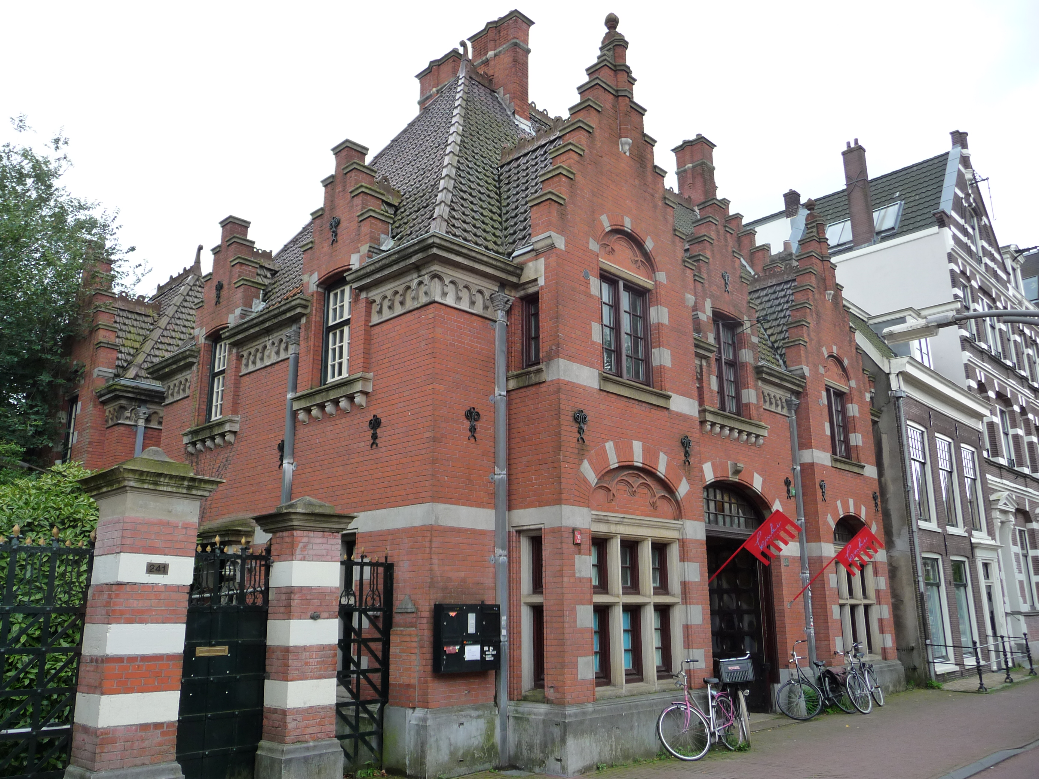 Rijksmonument Overtoom 243, Amsterdam